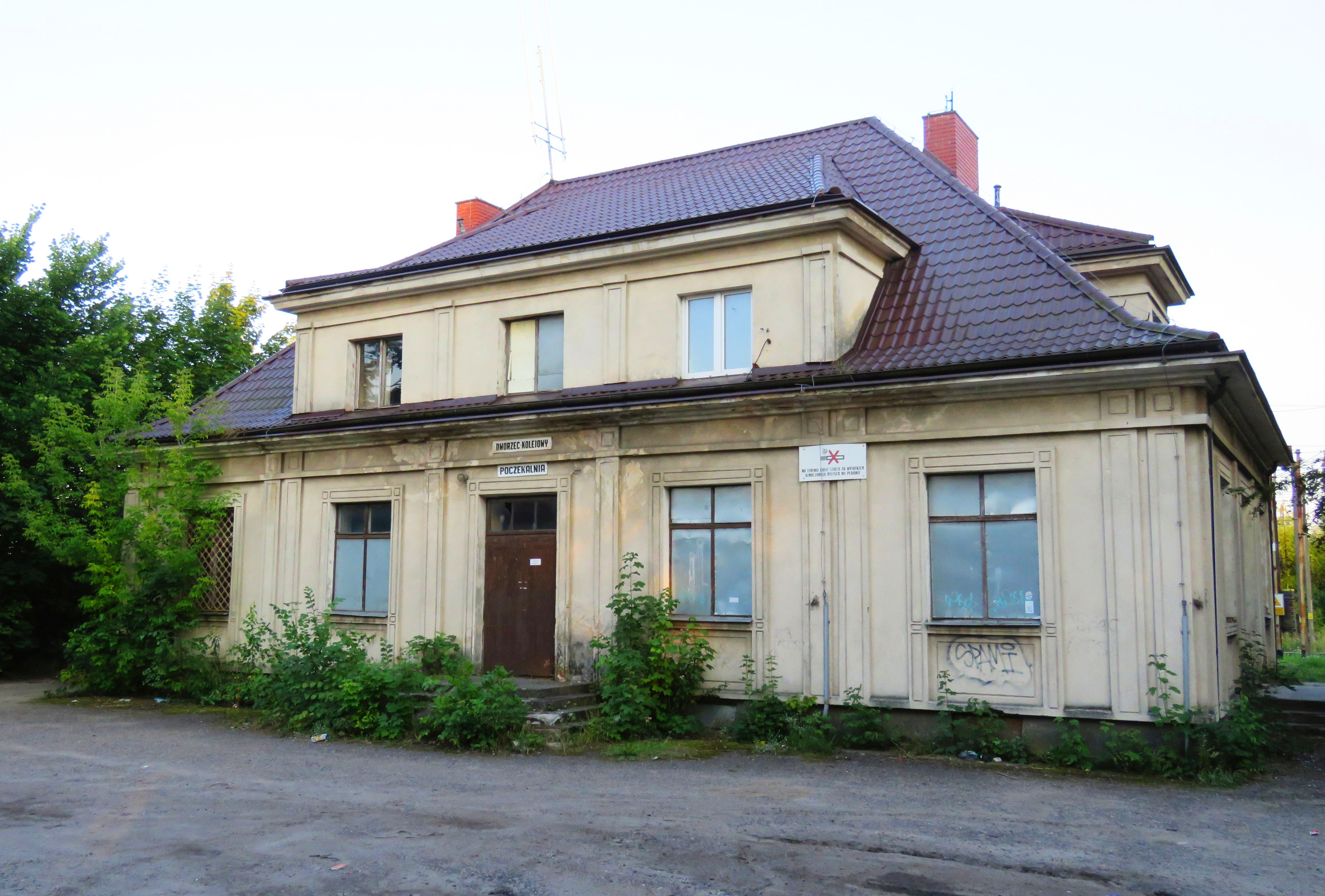 Tarczyn, dawna stacja kolejowa